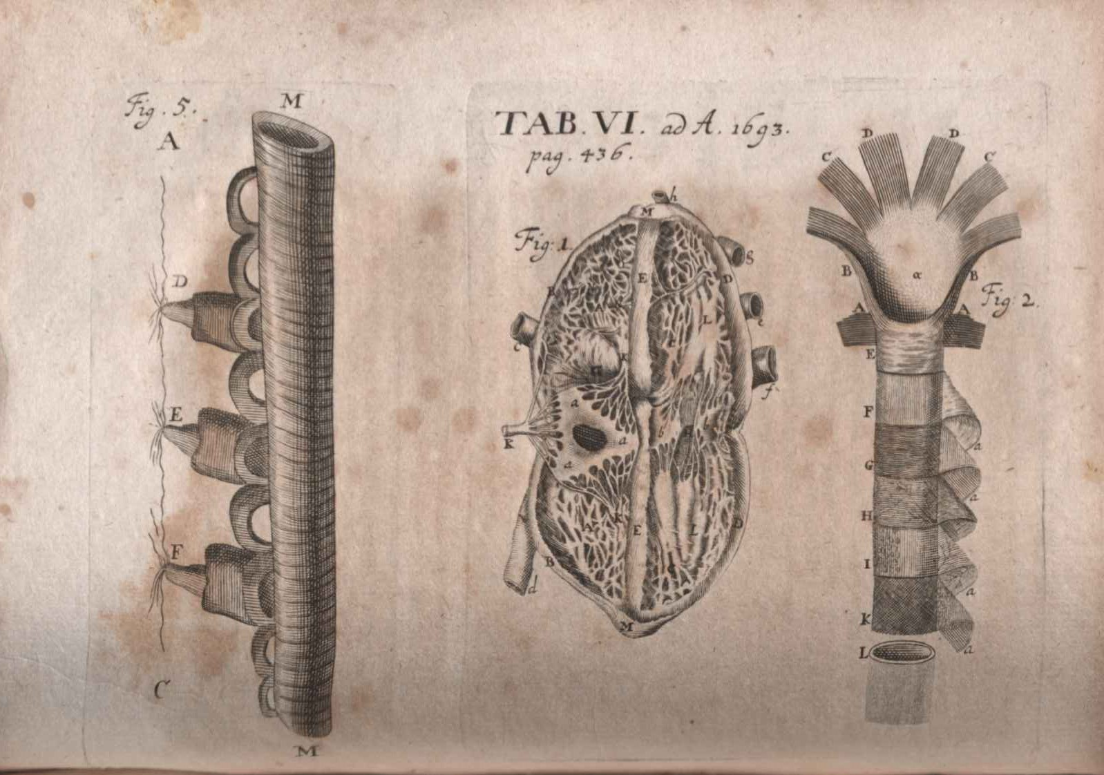 Illustration